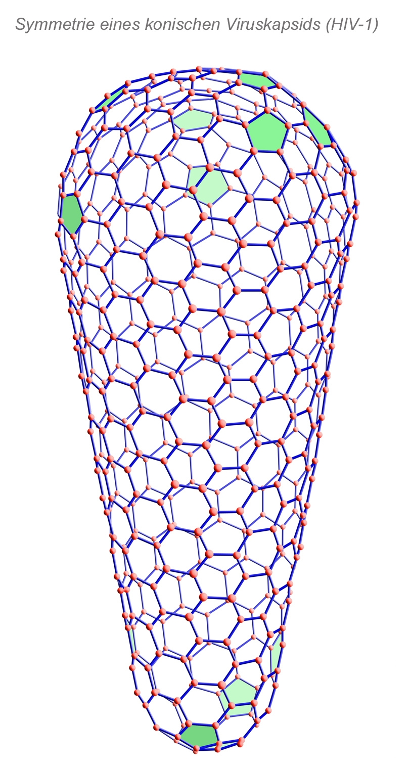 Darstellung der Symmetrie eines konischen Viruskapsids am Beispiel des HIV-1 nach den Berechnungen von Ganser BK et al., Science (1999) 283, 80